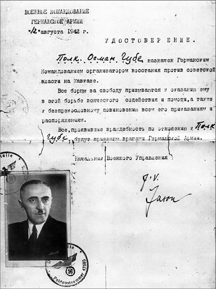 Удостоверение Османа Губе